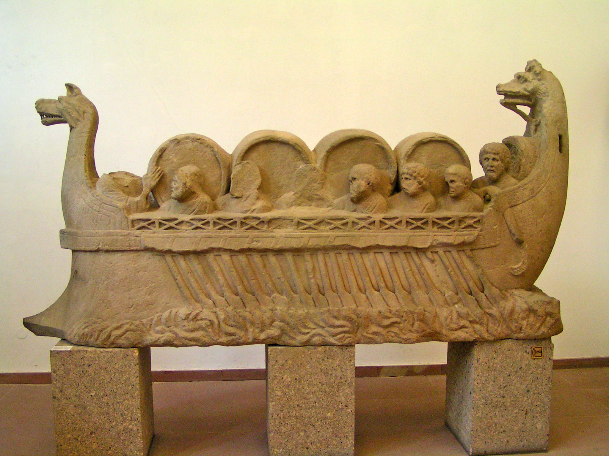 Neumagener Wäischëff